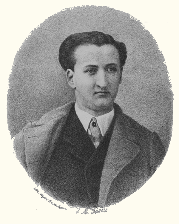 Portrait de Jules Pierre Fourreau (1844-4871) - Publié par la société linnéenne de Lyon en 1873.